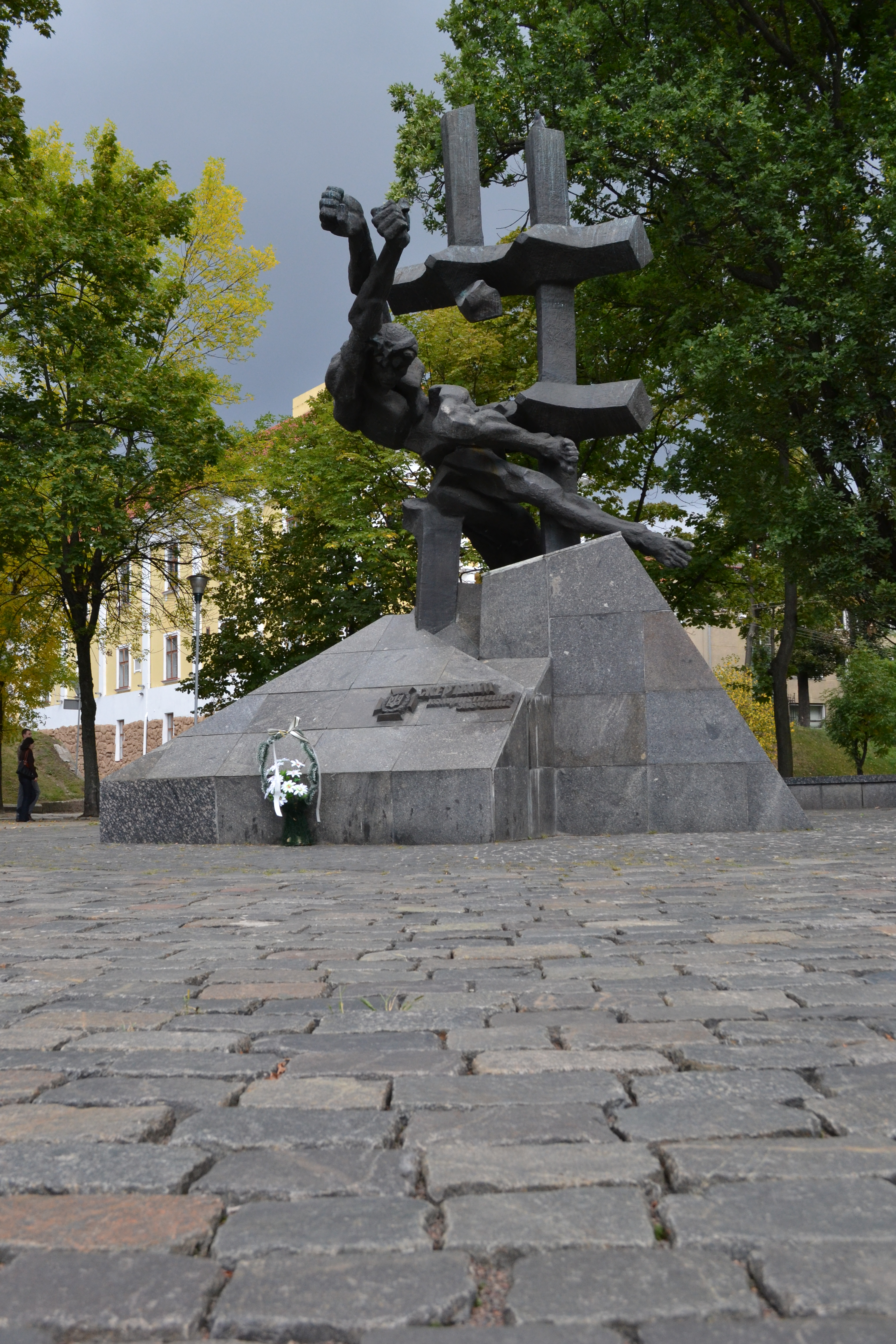 вул. Шашкевича